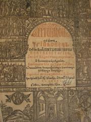 Тріодь цвітна. Львів, друкарня братства, 9.I 1688. 2°. [6], 440, [1] арк. Рядків - 29, 41. Друк у дві фарби. Тираж [1260 прим.]. Шрифти: 10 рядків — 81,5, 59 мм. Гравюри: форта, успіння богородиці і малий друкарський знак братства (зв. титулу), велика друкарська марка братства (ост. арк. зв.), 24 ілюстрації в тексті (деякі повторюються), заставки, кінцівки, ініціальні літери. Виливні прикраси. Друкар: [В. Ставницький]. Гравери: EZ, Ілля, Василь Ушакевич, Георгій ієродиякон, Афанасій К., ВФЗ, WS, ЛП. Передрук видання 1663 р. з незначними змінами, переважно орфографічними. Ундольский, 1061; Петров, Бирюк, Золотарь, 303; Львівські видання.., 79; Максименко, 43. ДПБ, БАН, ЦНБ, КПЛ, ЛБАН, ЛМУМ, ЛКГ, Івано-Франківський музей, Острозький музей, Саноцький історичний музей та ін.